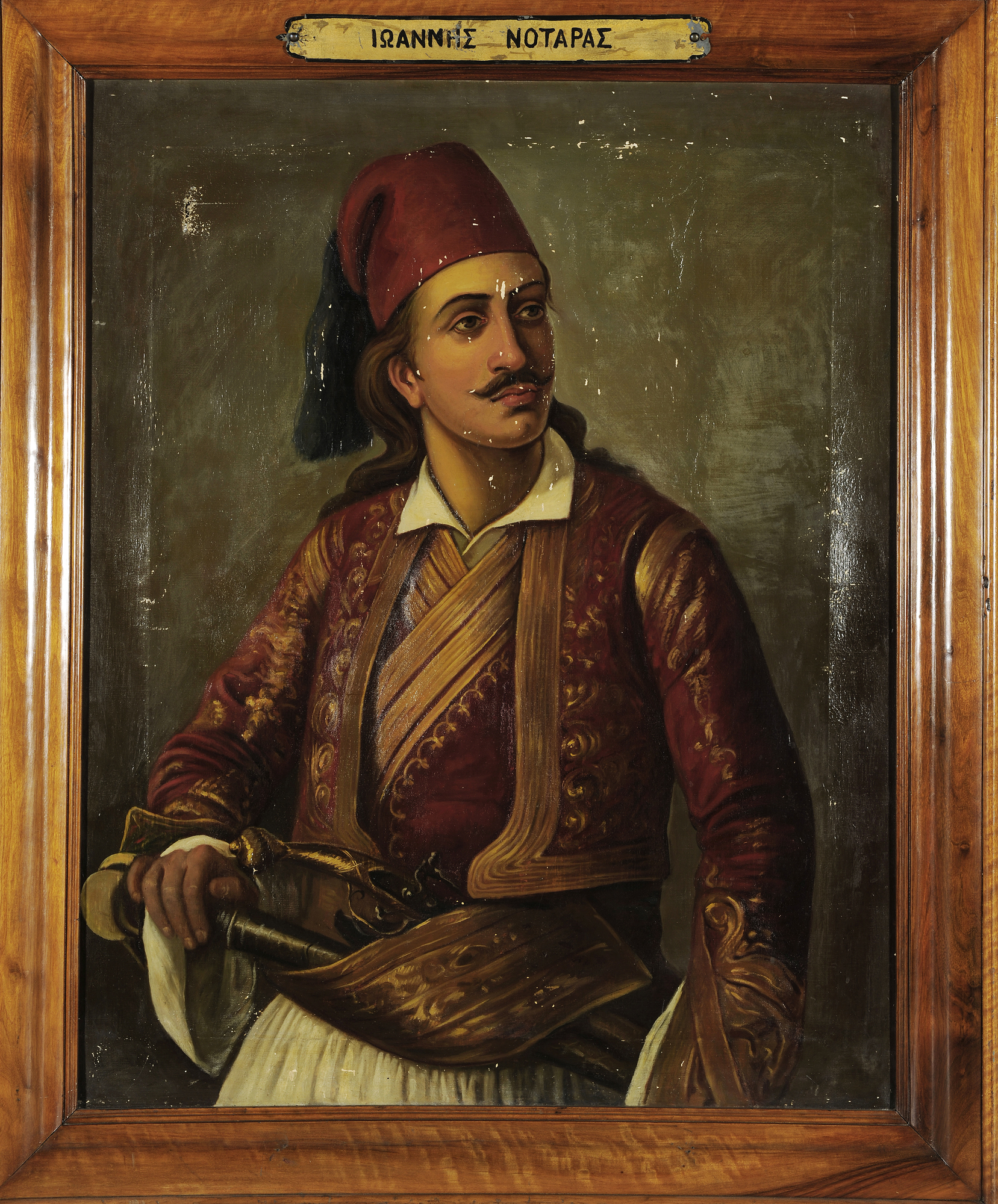 Ο Ιωάννης Νοταράς, έργο αγνώστου, ελαιογραφία σε μουσαμά, 1 Χ 0,80 μ. (254).